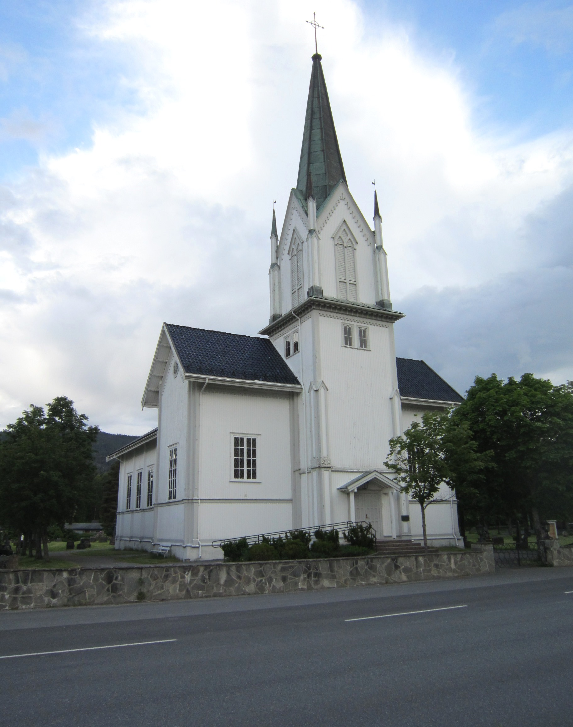 Bakke kirke i Øvre Eiker med fylkesvei 62 foran